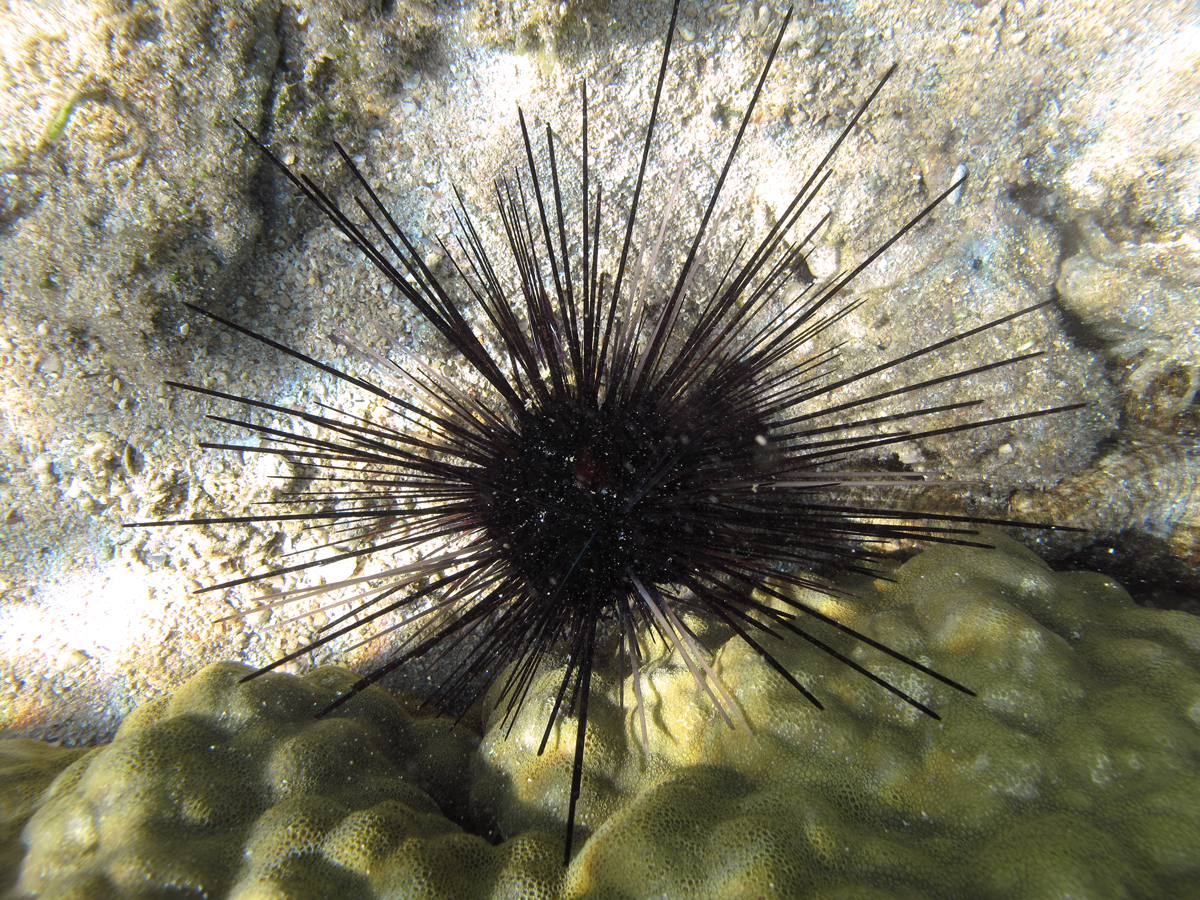 Oursin diadème non identifié (Diadema savignyi ?) à la Réunion.